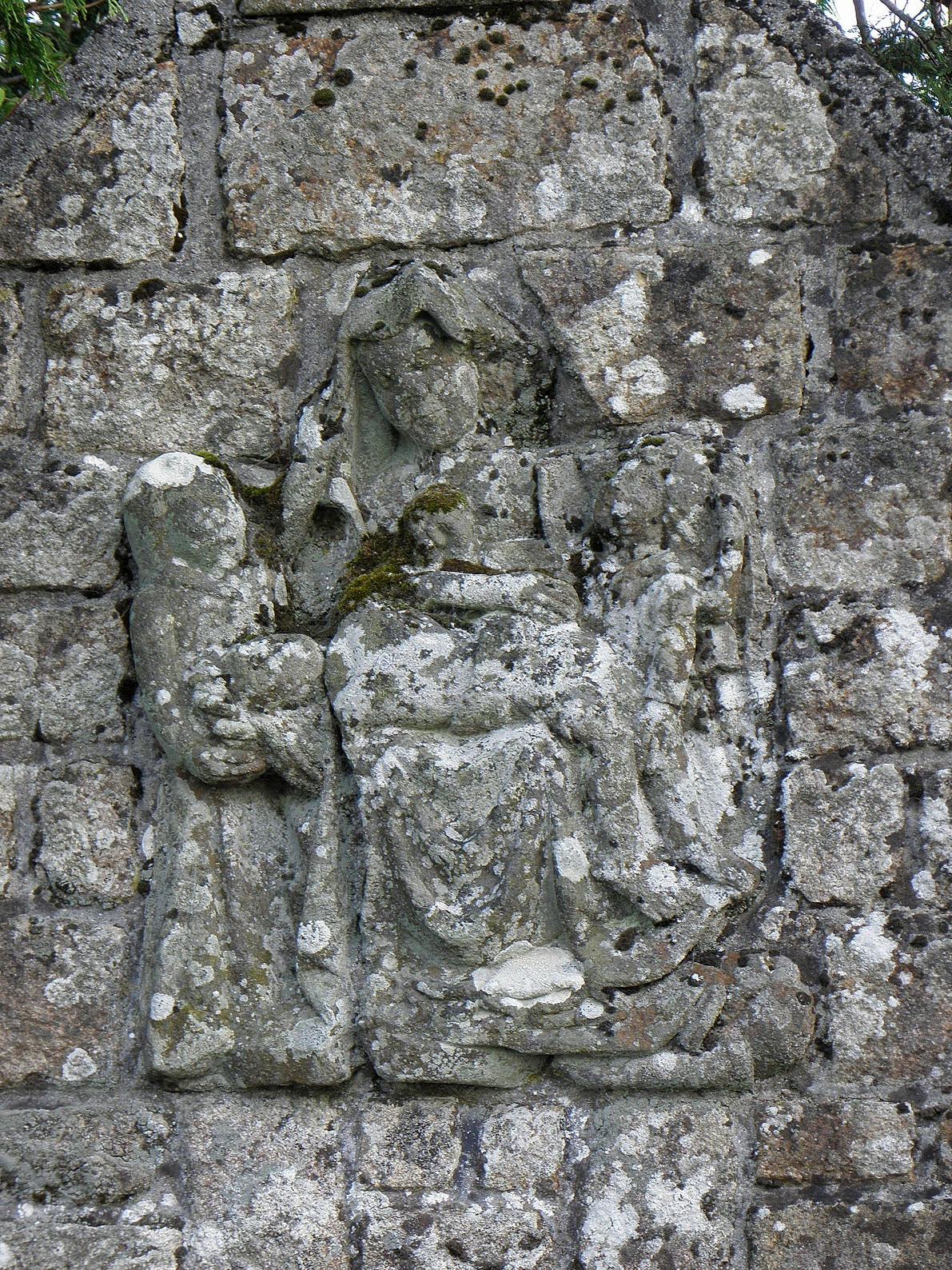 Pietà ornant l'entrée d'une propriété à proximité de l'église de Laz (29).